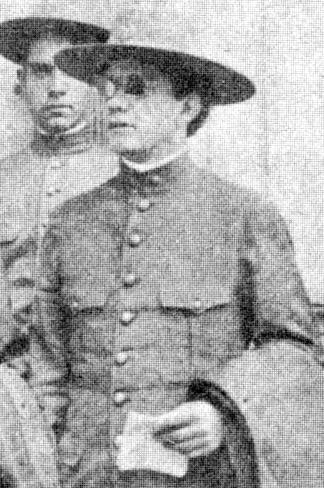 El general Eduardo Hay en la Convencion de Aguascalientes.